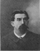 Jean Allemane (1843-1935)